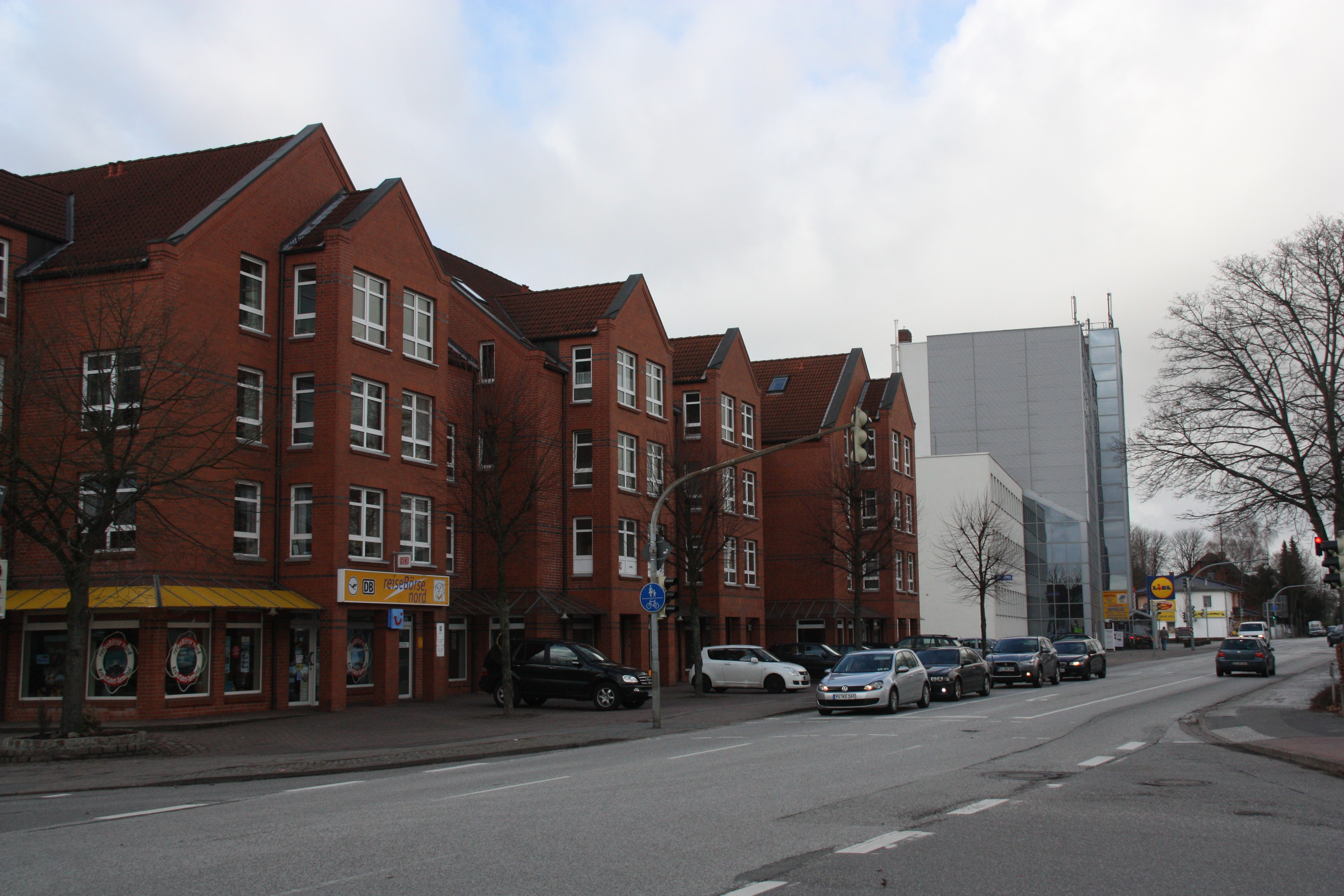 Bönningstedt, Kieler Straße, Ladenzeile und ehem. Gebäude der Rugenberger Mühle